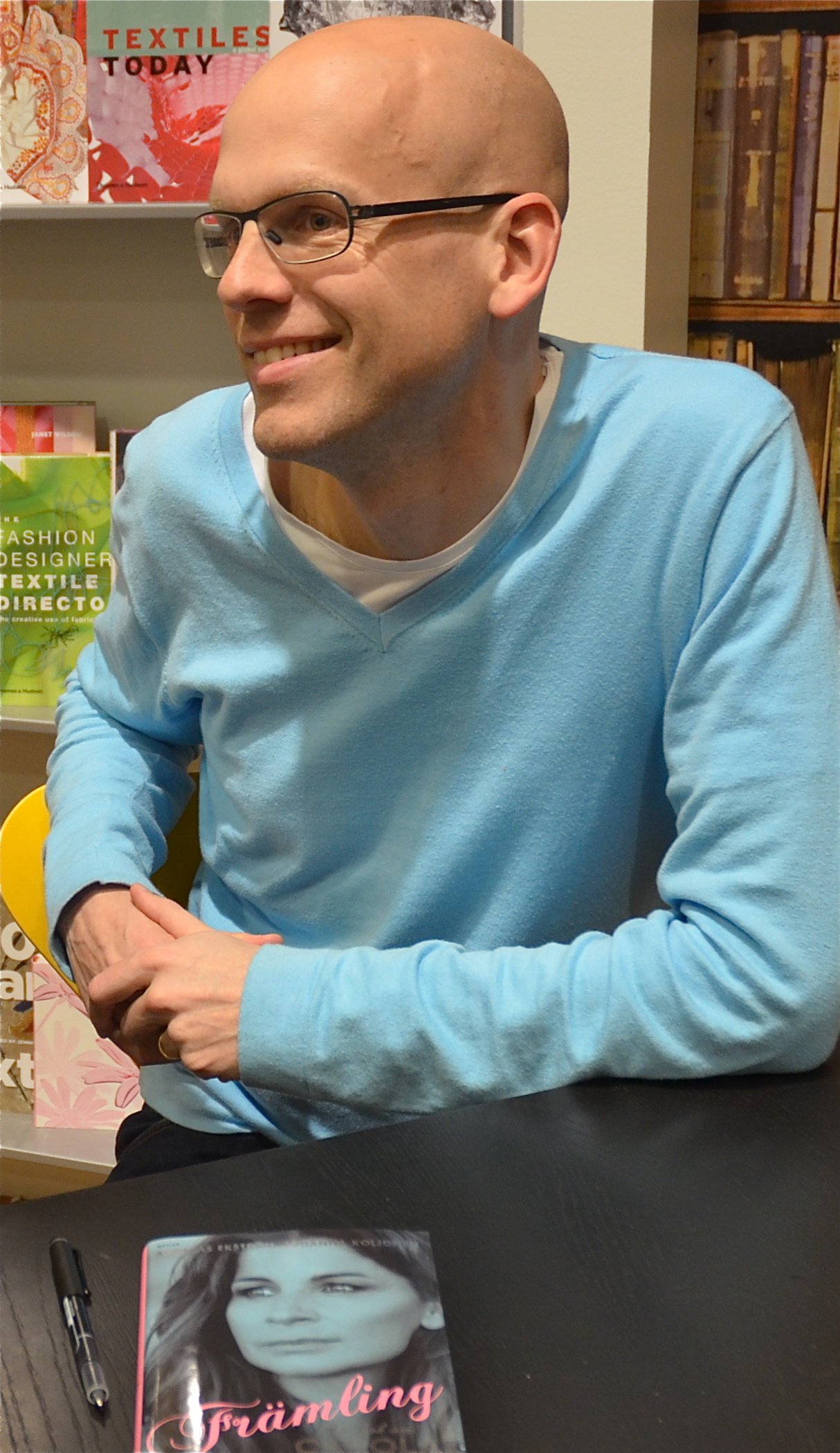 Andreas Ekström på Akademibokhandeln City/Stockholm 21 april 2012.